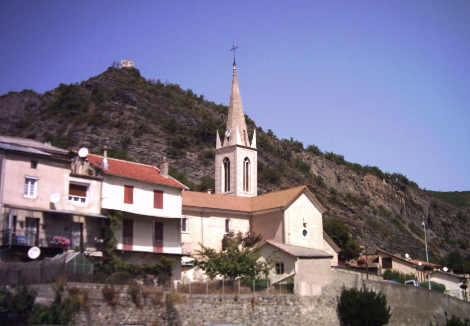 Le village de La Saulce (Hautes-Alpes)